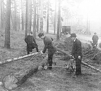 Prøving av Sector-saga ved Statens maskinprovingar i Sverige i 1917.